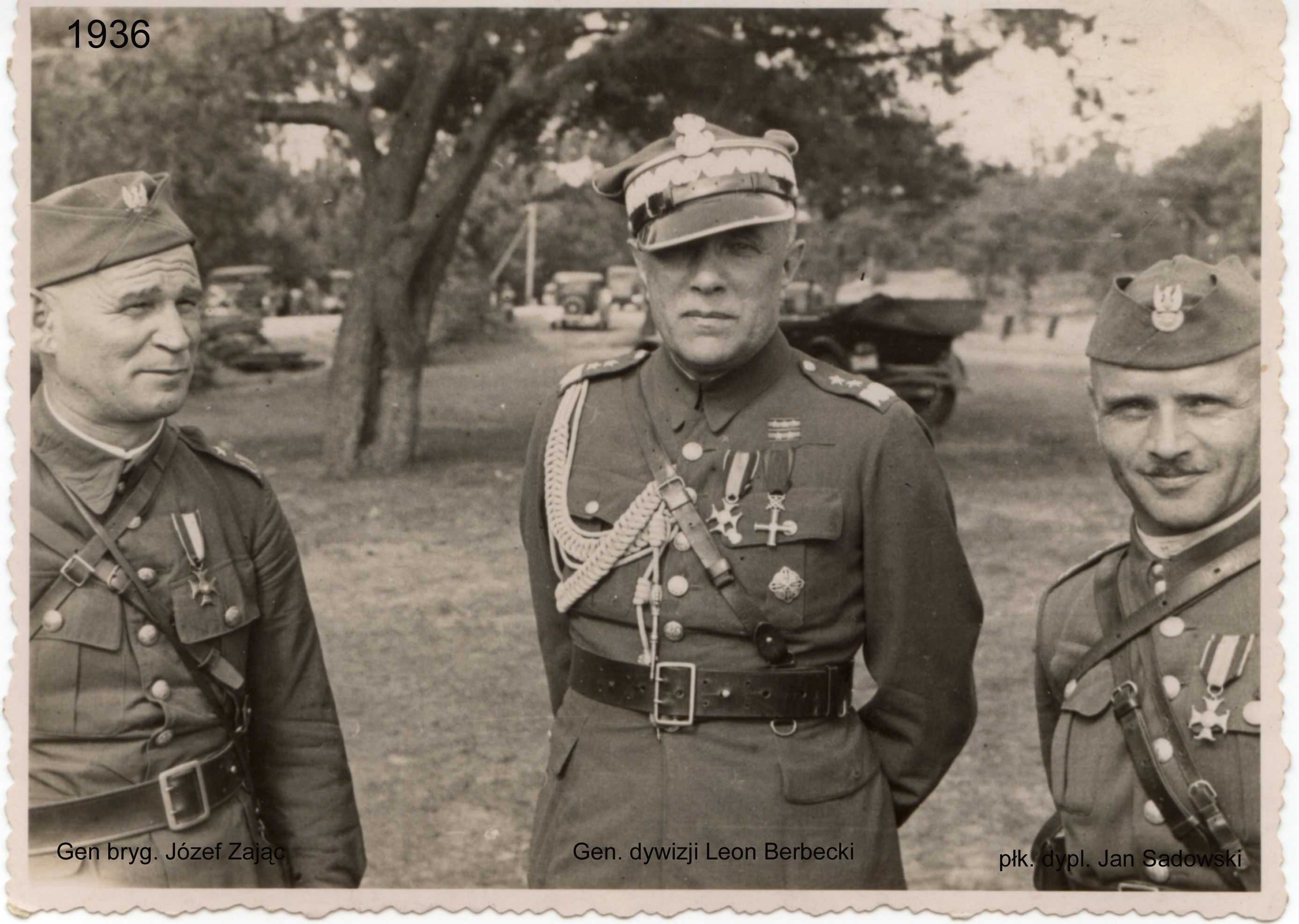 Gen. brygady Józef Zając, gen. dyw. Leon Berbecki, płk.dypl. Jan Jagmin-Sadowski podczas wizytacji budowy O. War. Śląsk